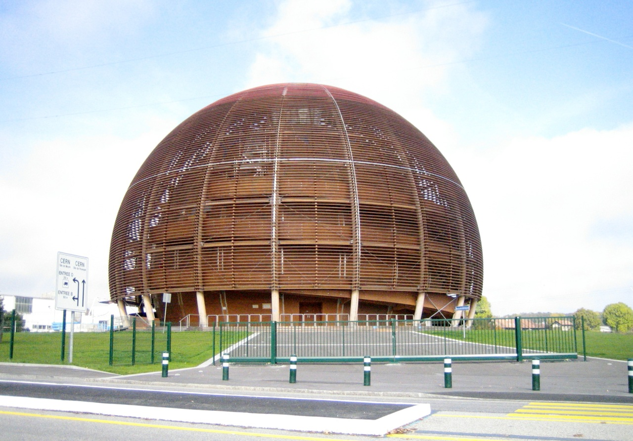 Le globe de la science au CERN près de Genève